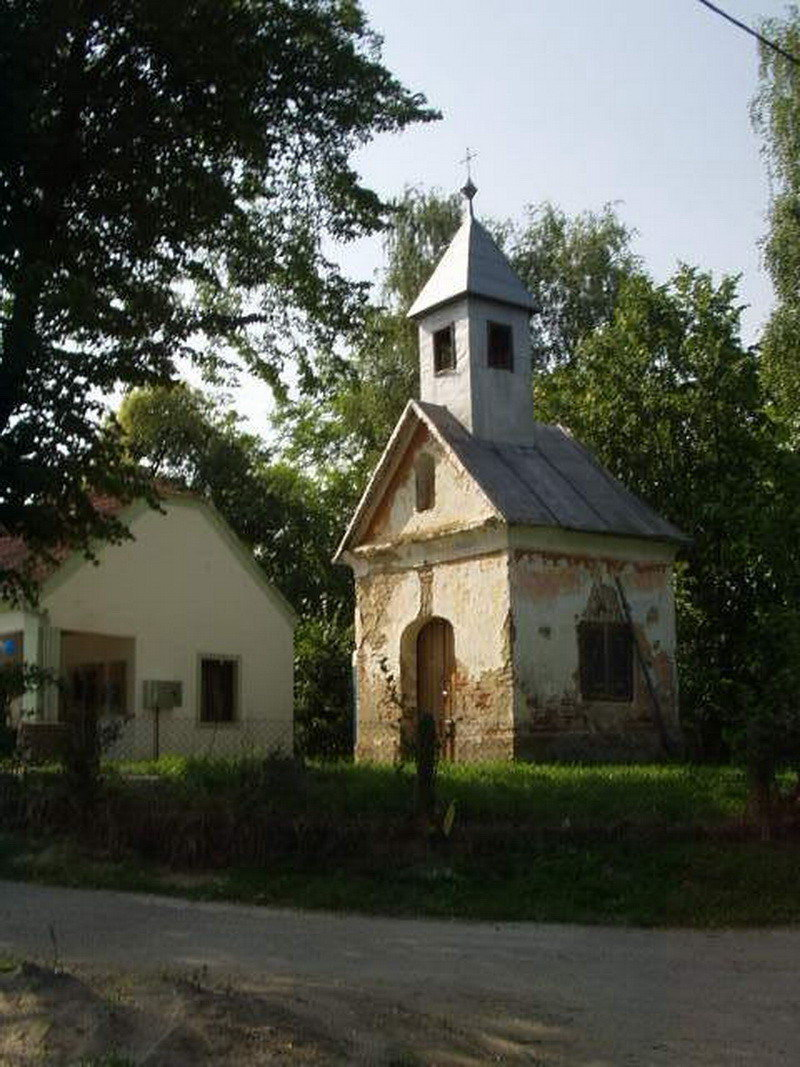 Gornja Obreška - Chapel